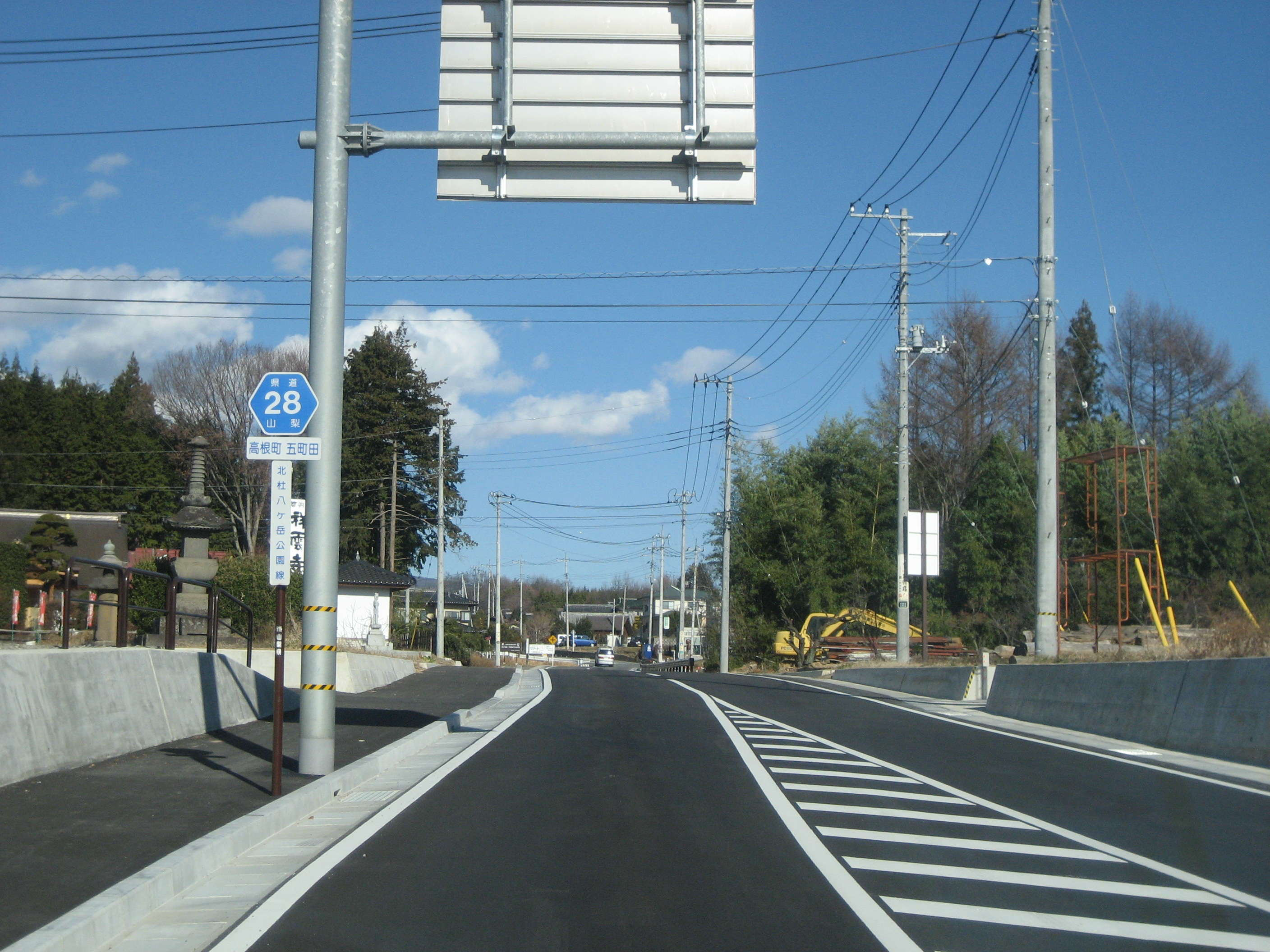 新潟県道28号線北杜市内